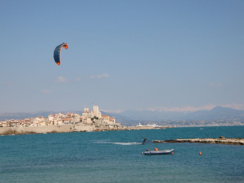 Kite surf à Antibes